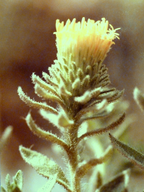 Jasonia glutinosa (=Chiliadenus glutinosus) [Té de roca] - Monte del Clementino/Cerro de Admajaleta, Albatera (Alicante, España)